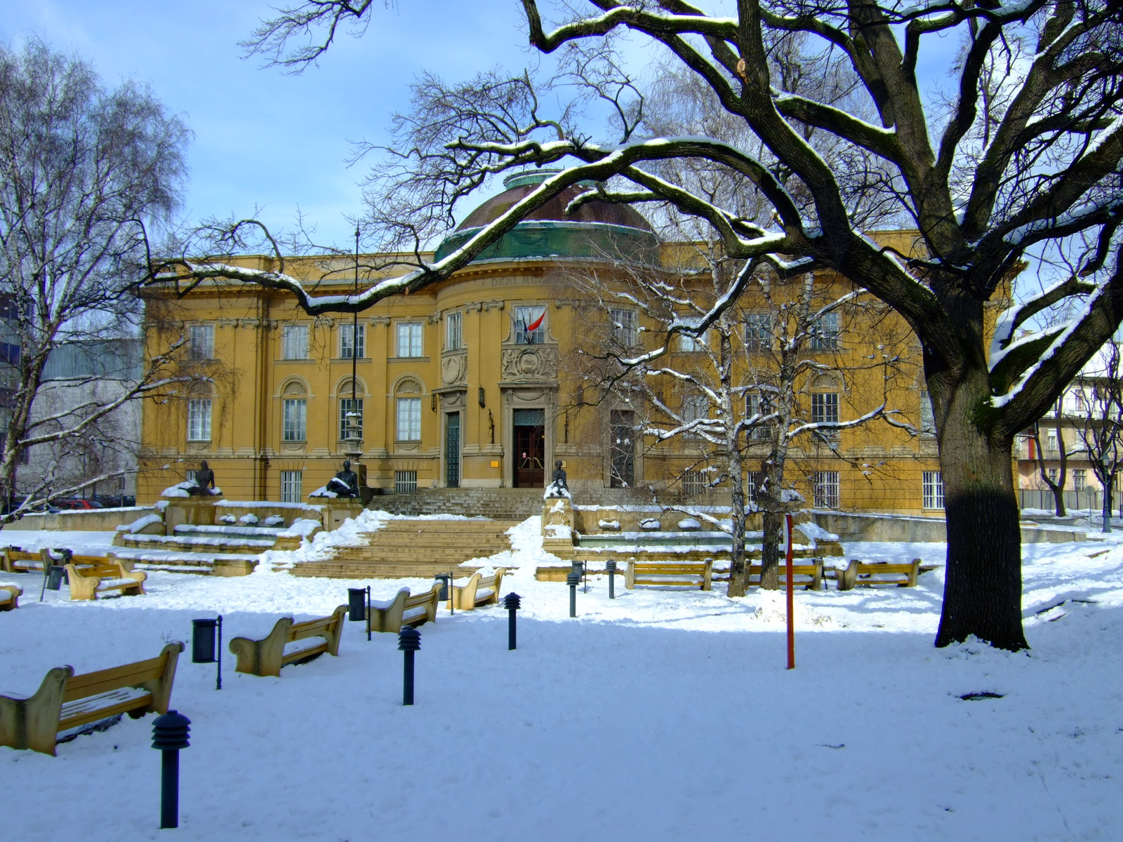 Déri Múzeum (Debrecen, Déri tér) This is a photo of a monument in Hungary. Identifier: 5226